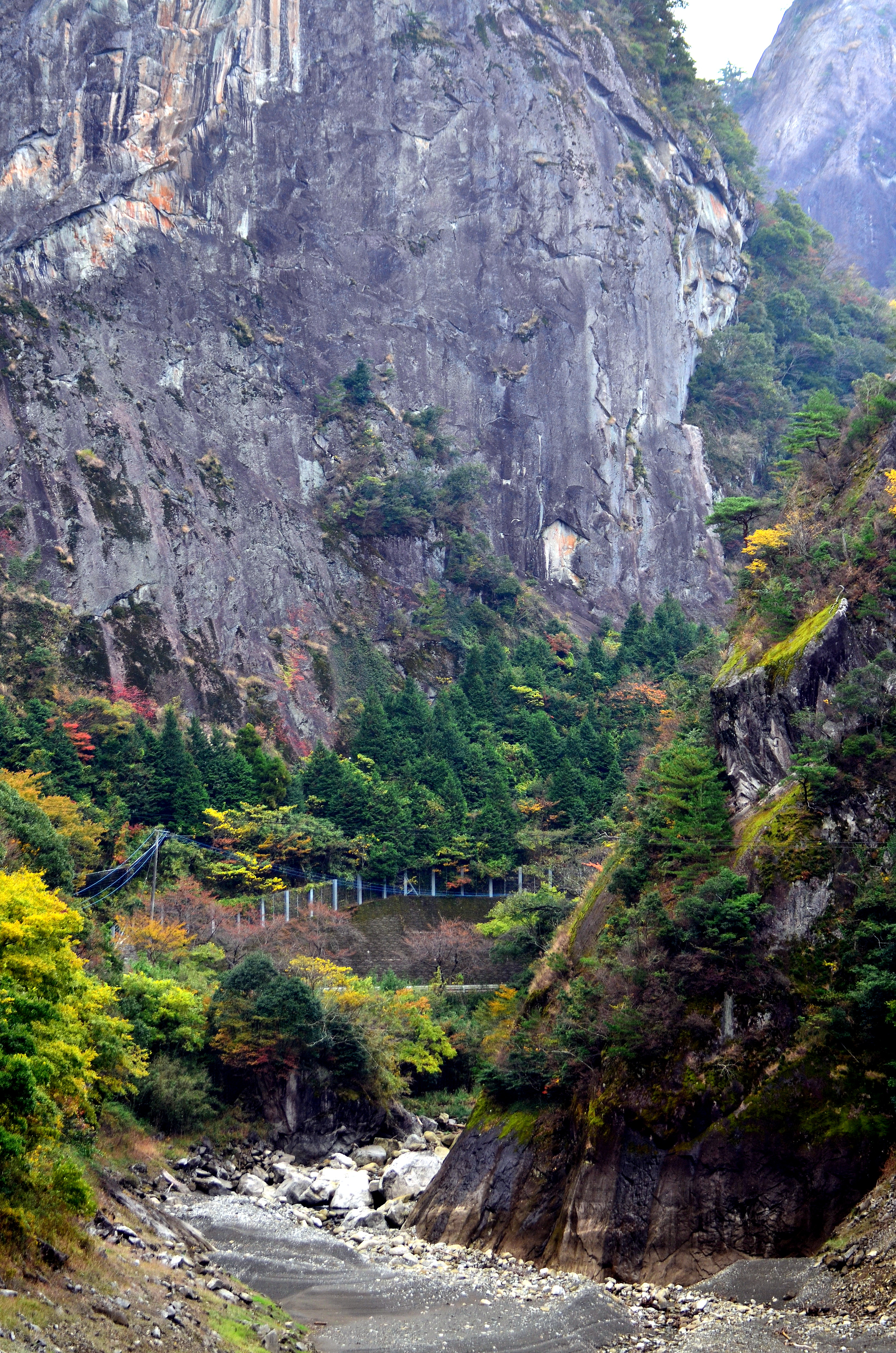 日向神峡の景観 Landscape Hyugamikyo